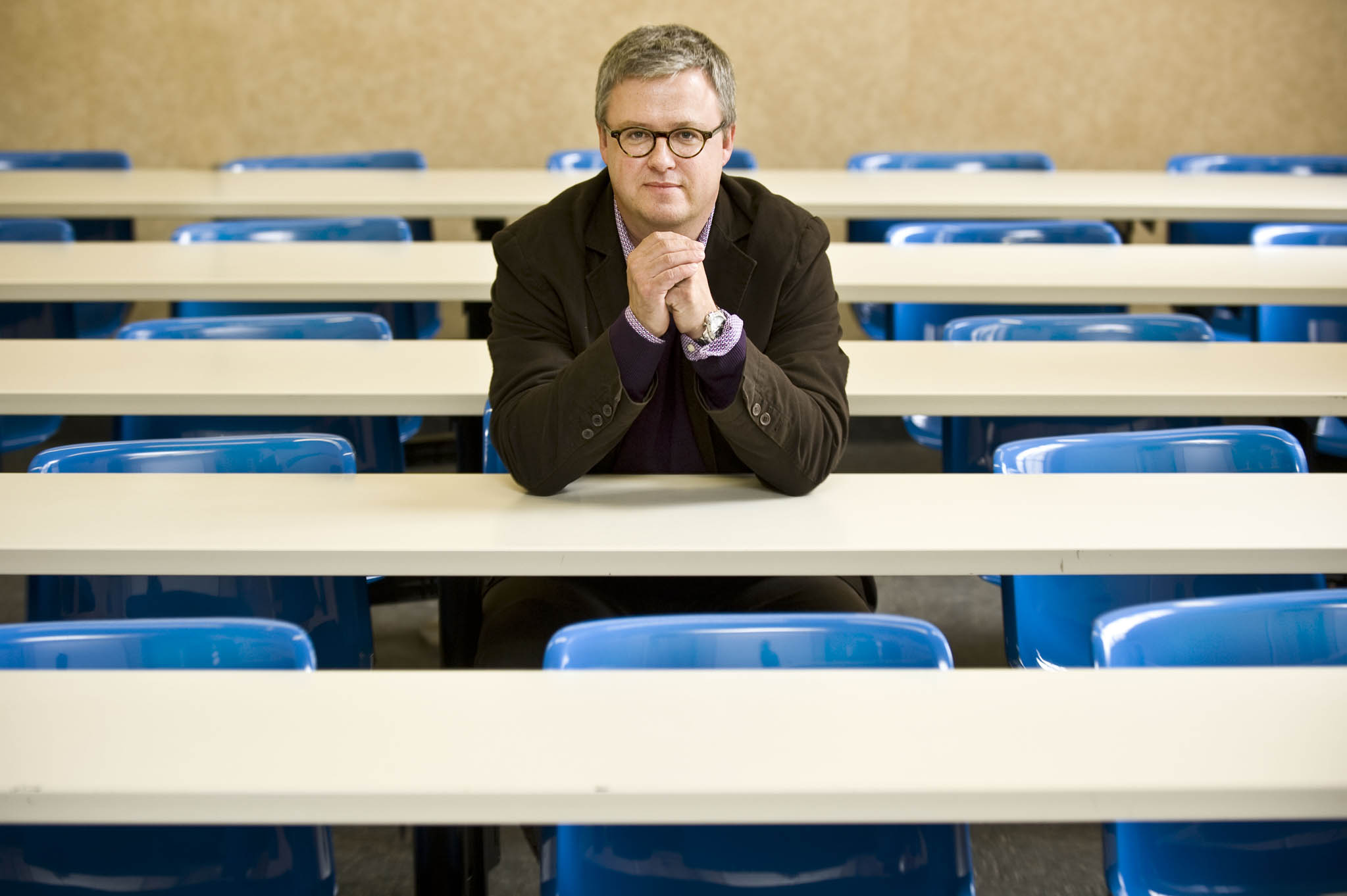 Carl Devos, Belgisch politicoloog en hoogleraar aan de faculteit politieke en sociale wetenschappen van de Universiteit Gent.